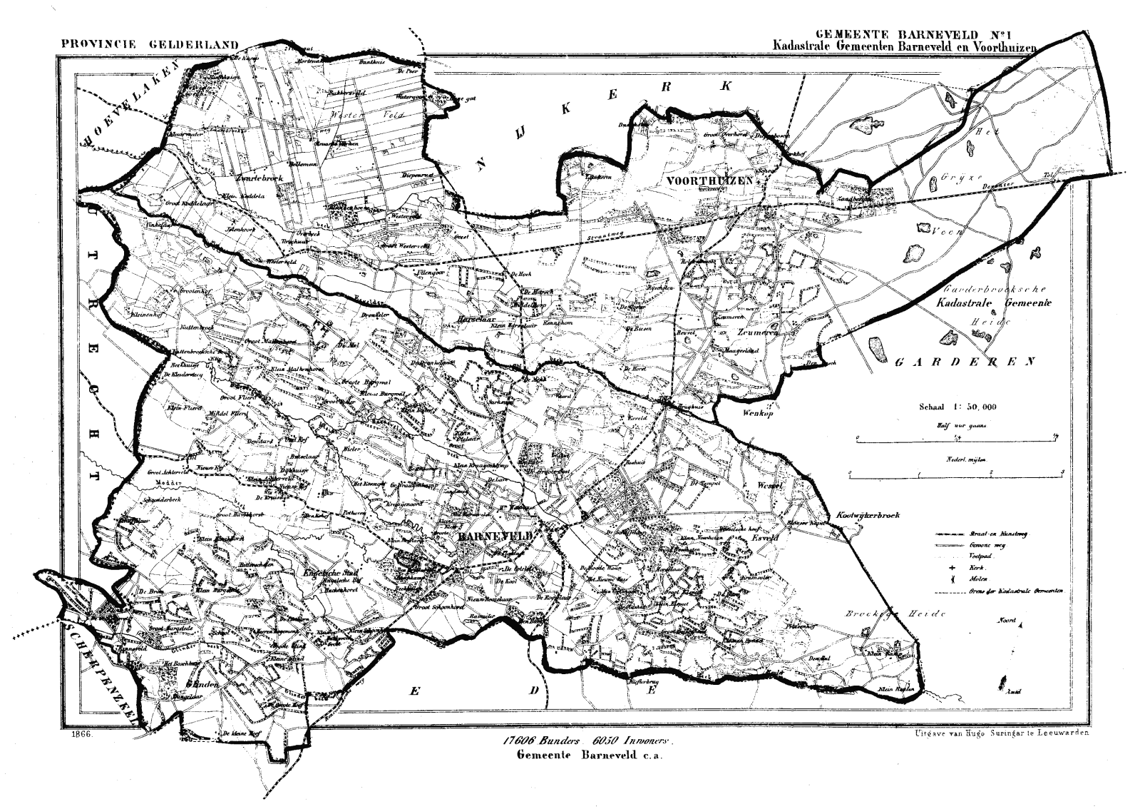 Kaart van Barneveld (gemeente) uit Gemeente Atlas van Nederland, J. Kuyper 1865-1870, Uitgave Hugo Suringar Leeuwarden.